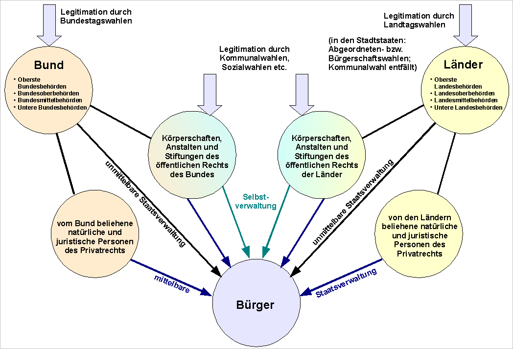 Legitimationskette der unmittelbaren und mittelbaren Staatsverwaltung sowie der Selbstverwaltung auf Bundes- und Landes- sowie Kommunalebene (stark vereinfacht und systematisiert) Autor: C.Löser Erstellt mit: de: Draw Siehe auch: Bild:Legitimationskette unmittelbare Staatsverwaltung vereinfacht.png